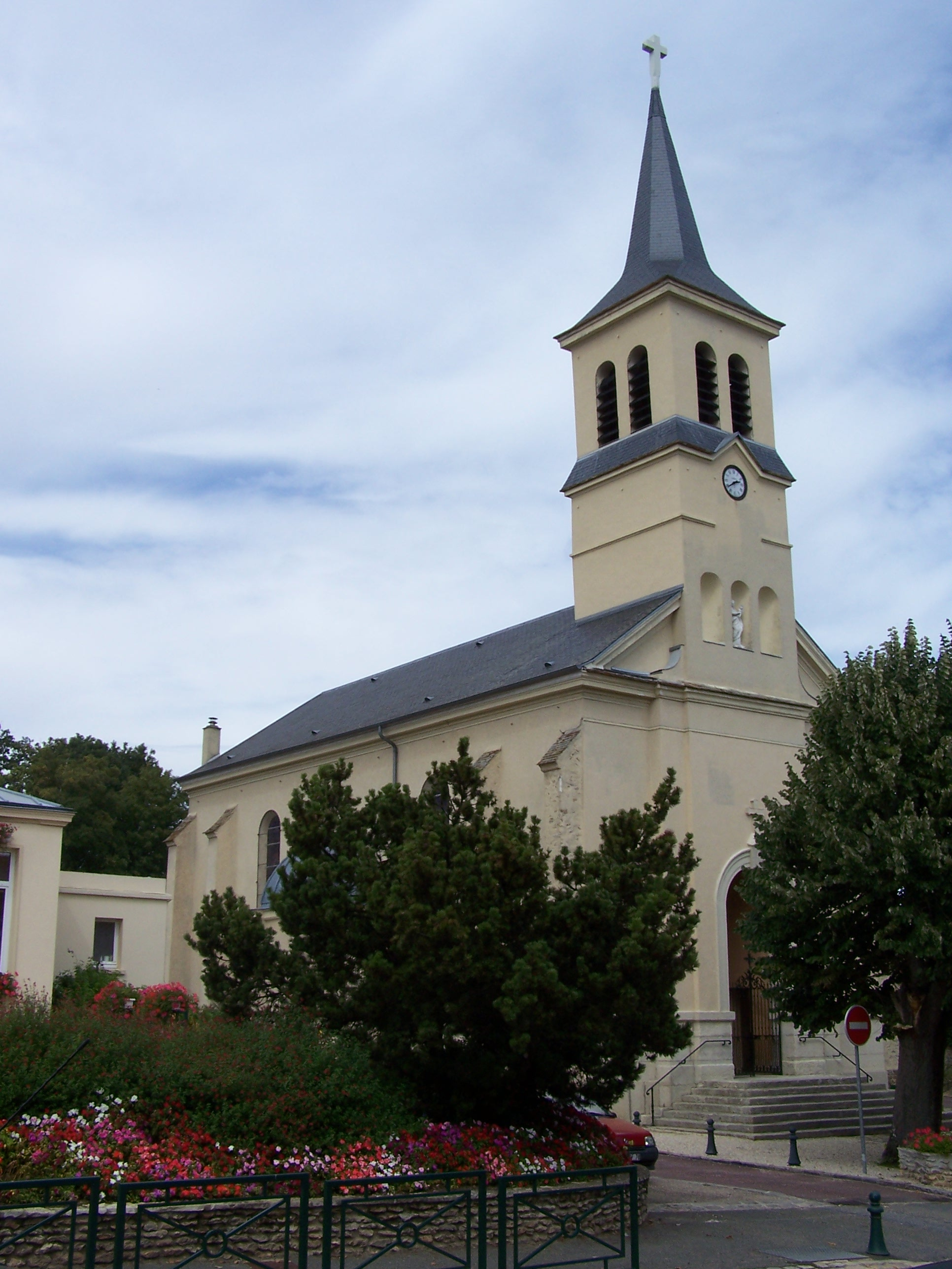 Église Saint-Nicolas de La Queue-lez-Yvelines (Yvelines, France). Photo personnelle. Church of La Queue-lez-Yvelines (Yvelines, France). Personal photo. Auteur/Author : Henry Salomé